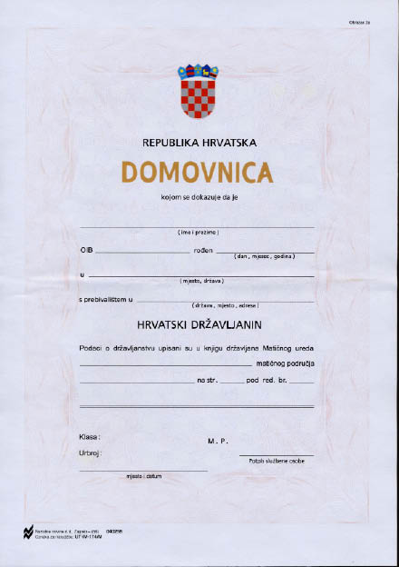 Obrazac domovnice